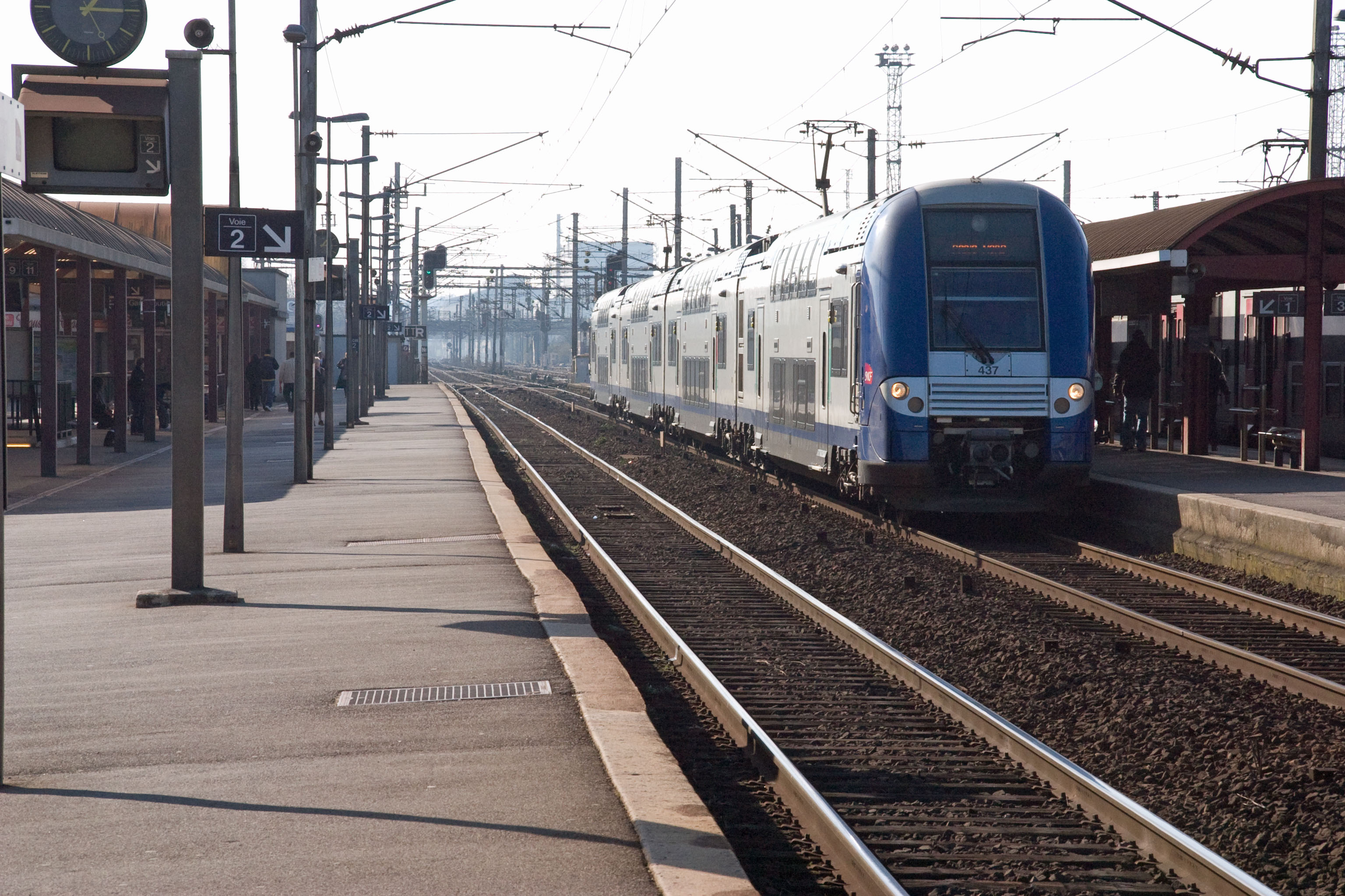 Gare de Creil, Creil, département de l'Oise (France)